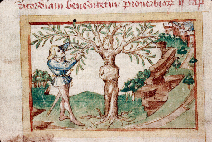 Apollon et Daphné transformée en laurier. Epitre d'Othea. Lille - BM - ms. 0391 (f. 086v)